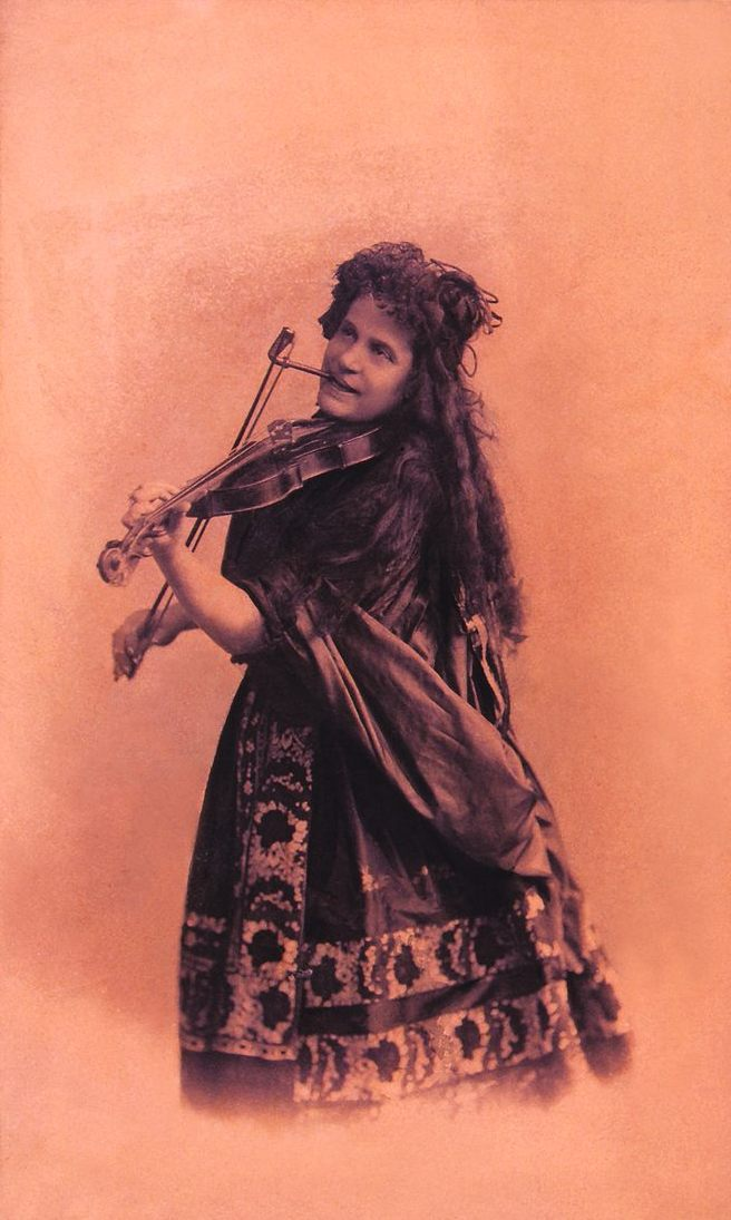 Hegyi Aranka mint Czinka Panna Verő György: 1000 év című látványos színművének A Rákóczi induló alcímű képében